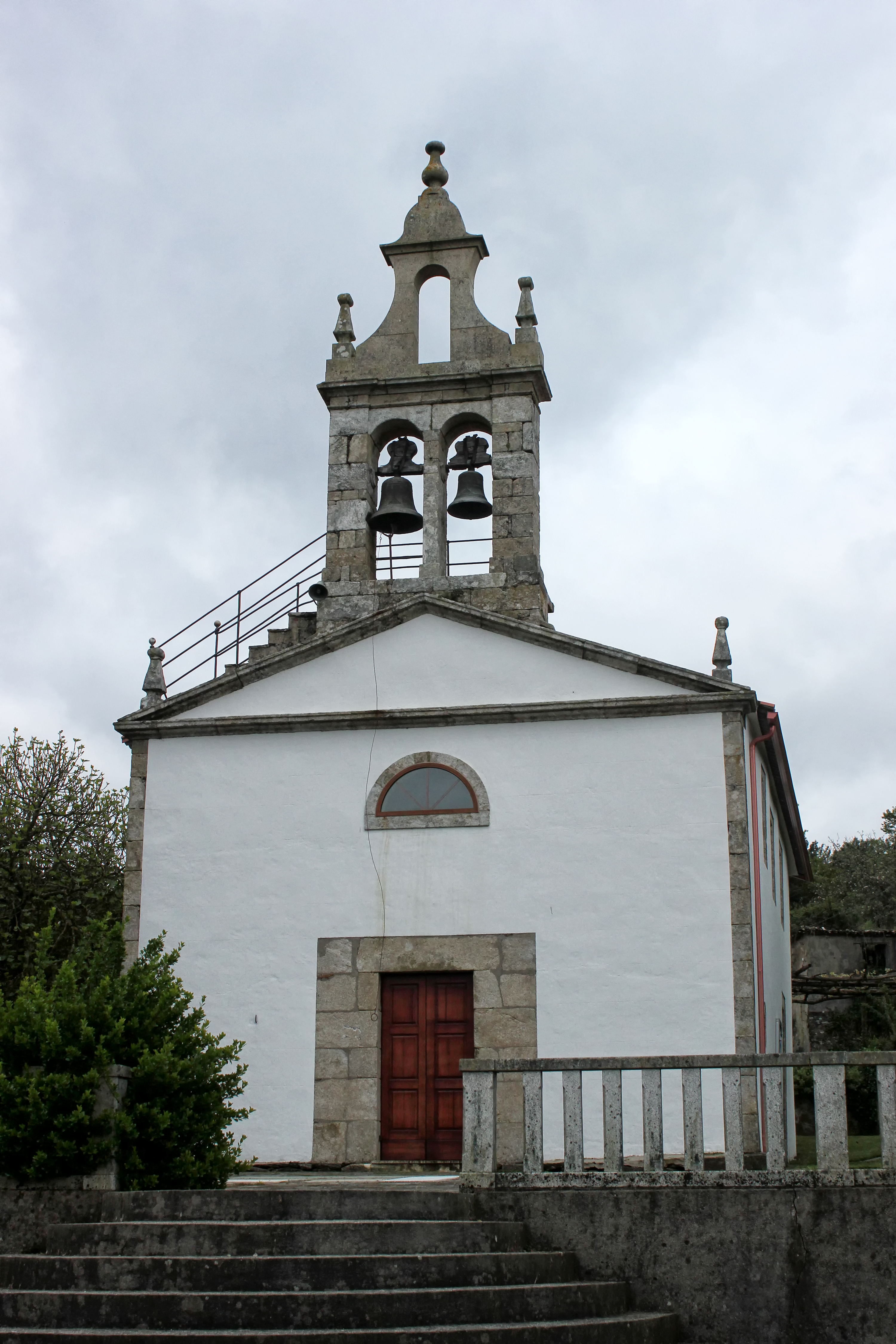 Igrexa de Gastrar, Boqueixón.